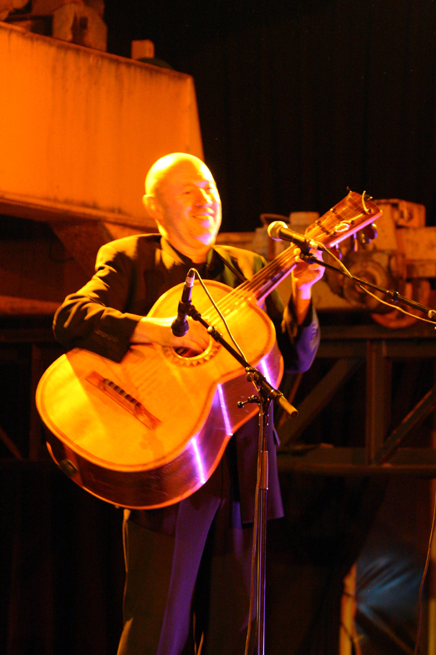 Nelson Gomez jouant du guitarron lors d'un concert du Quintet Extraño Norte dans la Carrière de Normandoux à Tercé ( Vienne )